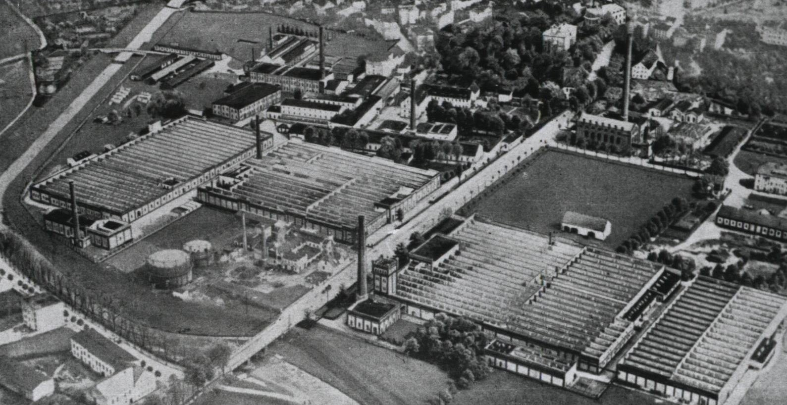 Prudnicka Gazownia widziana z lotu ptaka